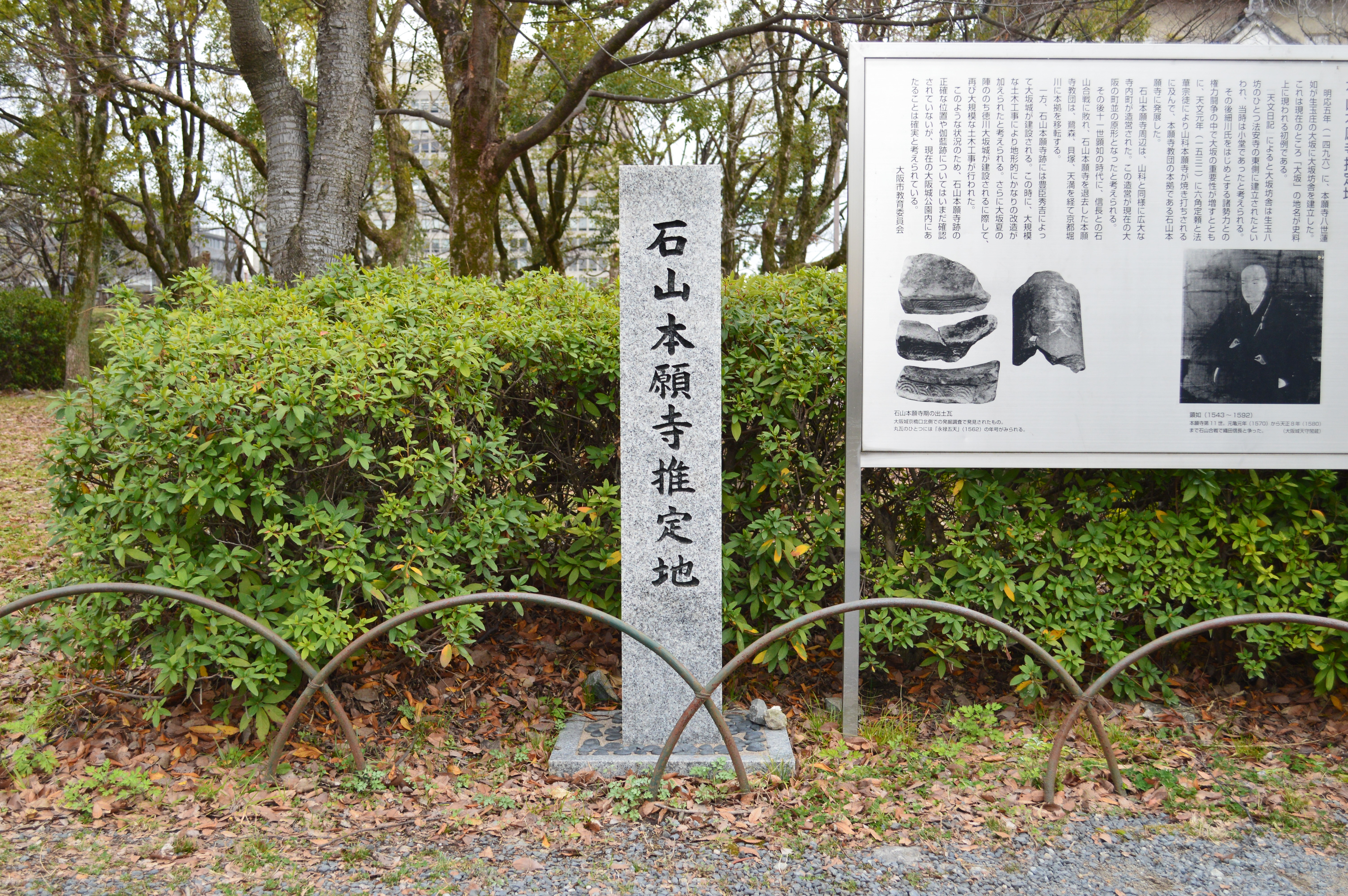 石山本願寺推定地碑 Nikon D3200